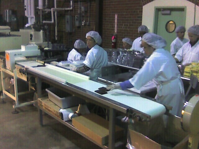 Best. Job. Evar.